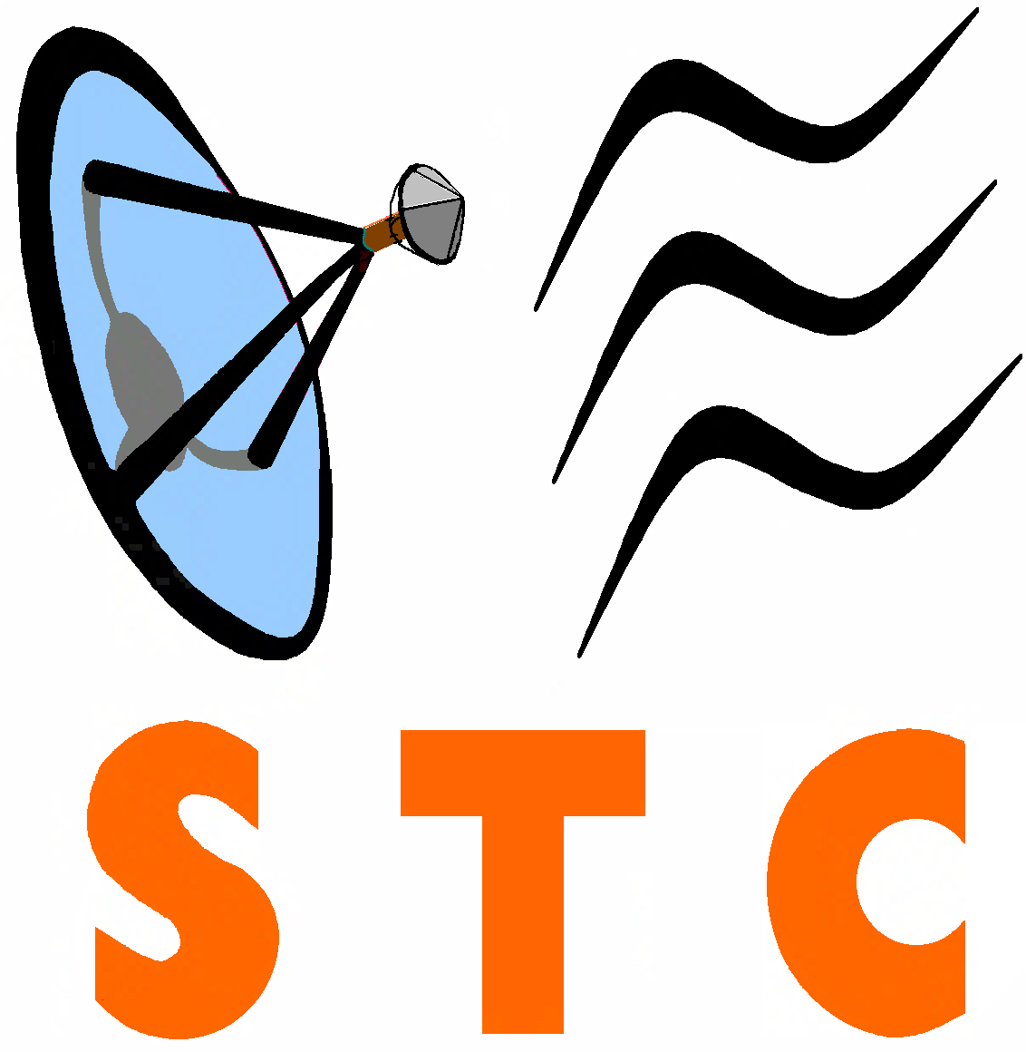 El anagrama del Sindicato STC es un conjunto que comprende una antena parabólica con tres bandas sinusoidales que surgen de la misma y las letras S.T.C. debajo de todo el conjunto.